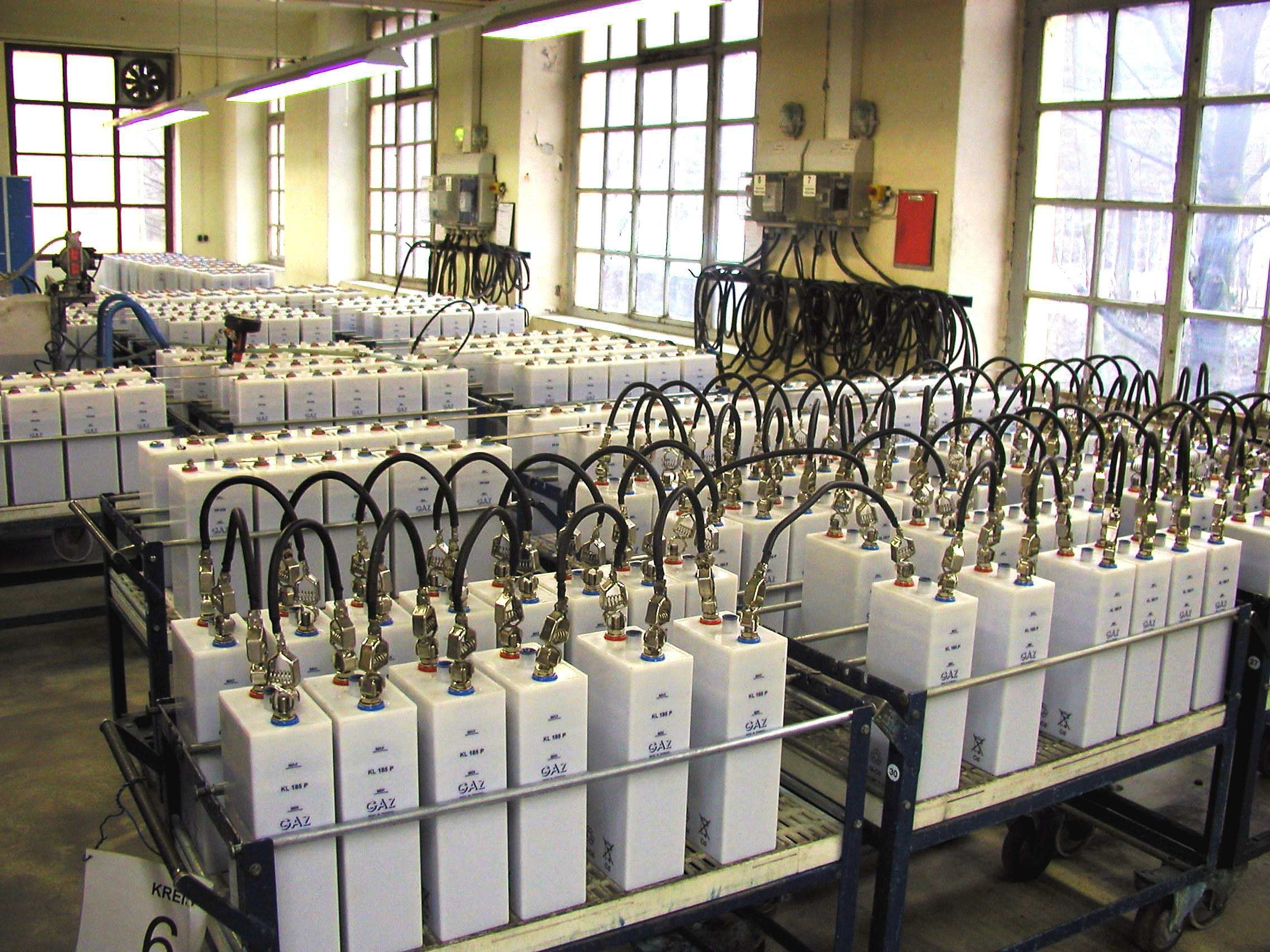 Fertigung 2011